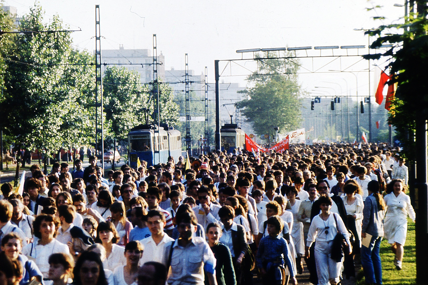 ulica Ślężna we Wrocławiu: tłum zmierzający na tor wyścigów konnych na Partynicach na spotkanie z papieżem Janem Pawłem II w czerwcu 1983